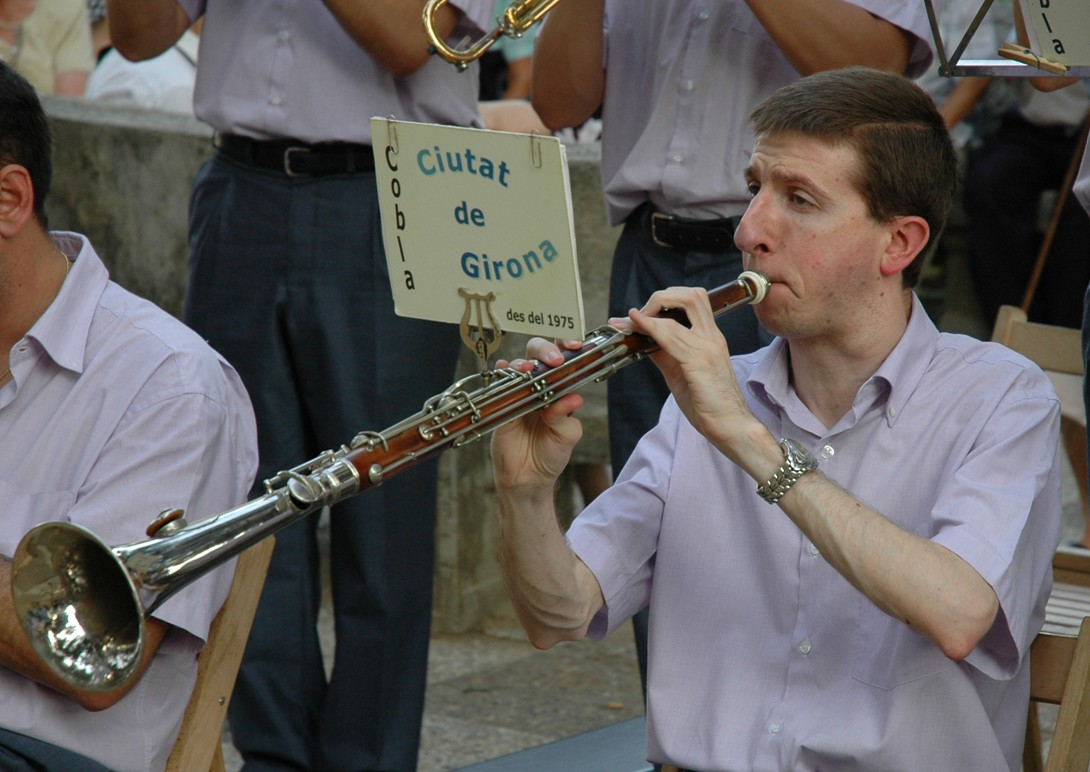 Josep Coll i Ferrando, compositor de sardanes